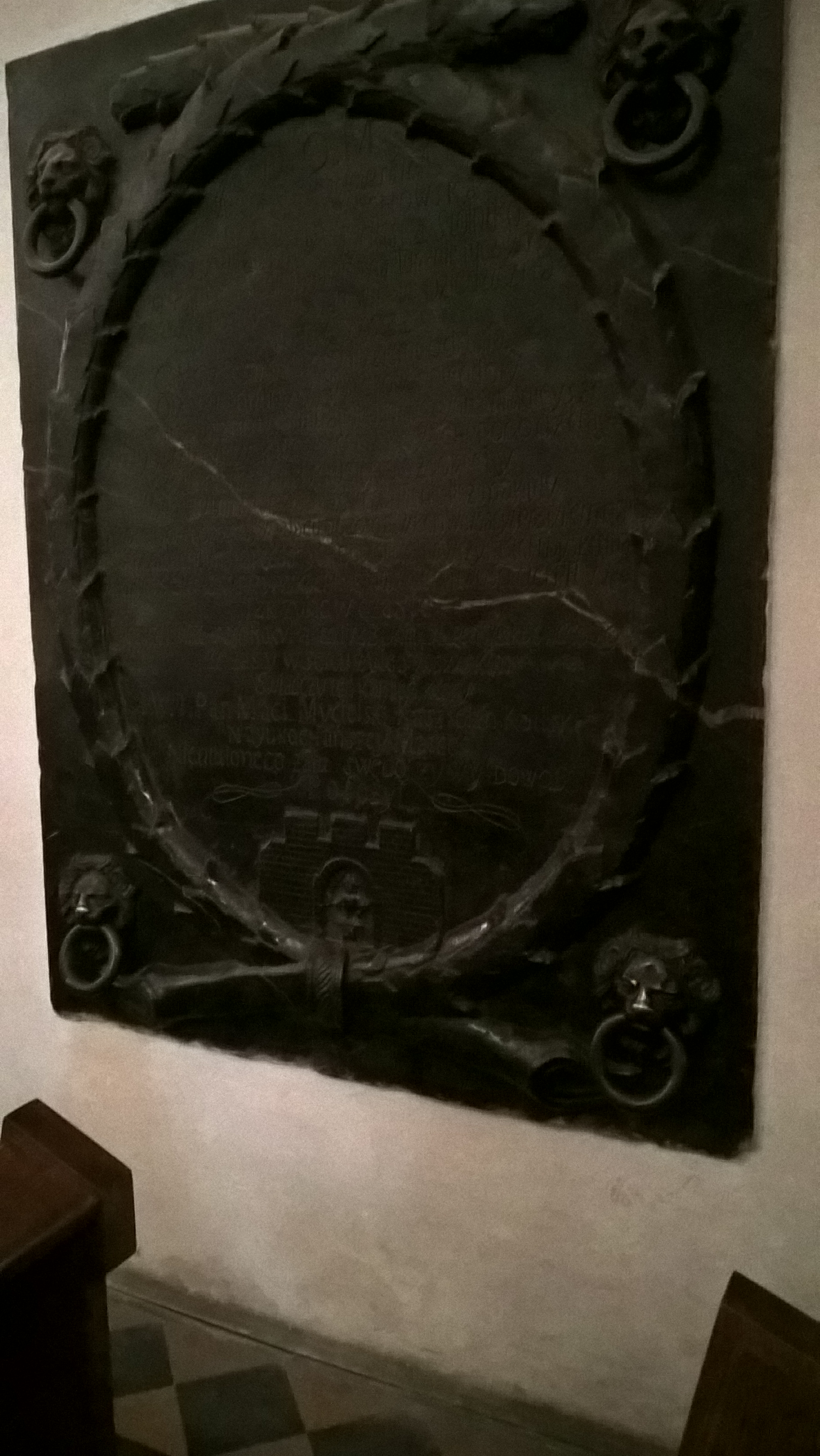 Bazylika w Szamotułach - Barokowa płyta nagrobna z czarnego marmuru z początku XVIII wieku – starościny powidzkiej – Anny z Niegolewskich, Mycielskiej, Tuczyńskiej. Obramowanie w kształcie wińca laurowego, na dole herb Niegoleskich, a w narożnikach b